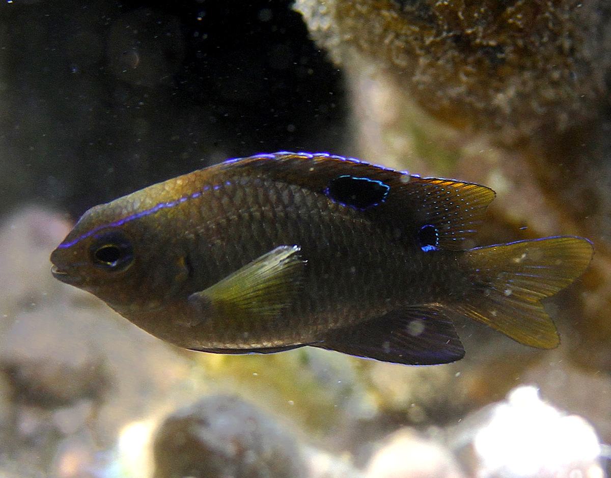 Une demoiselle à un point (Chrysiptera unimaculata) à la Réunion.